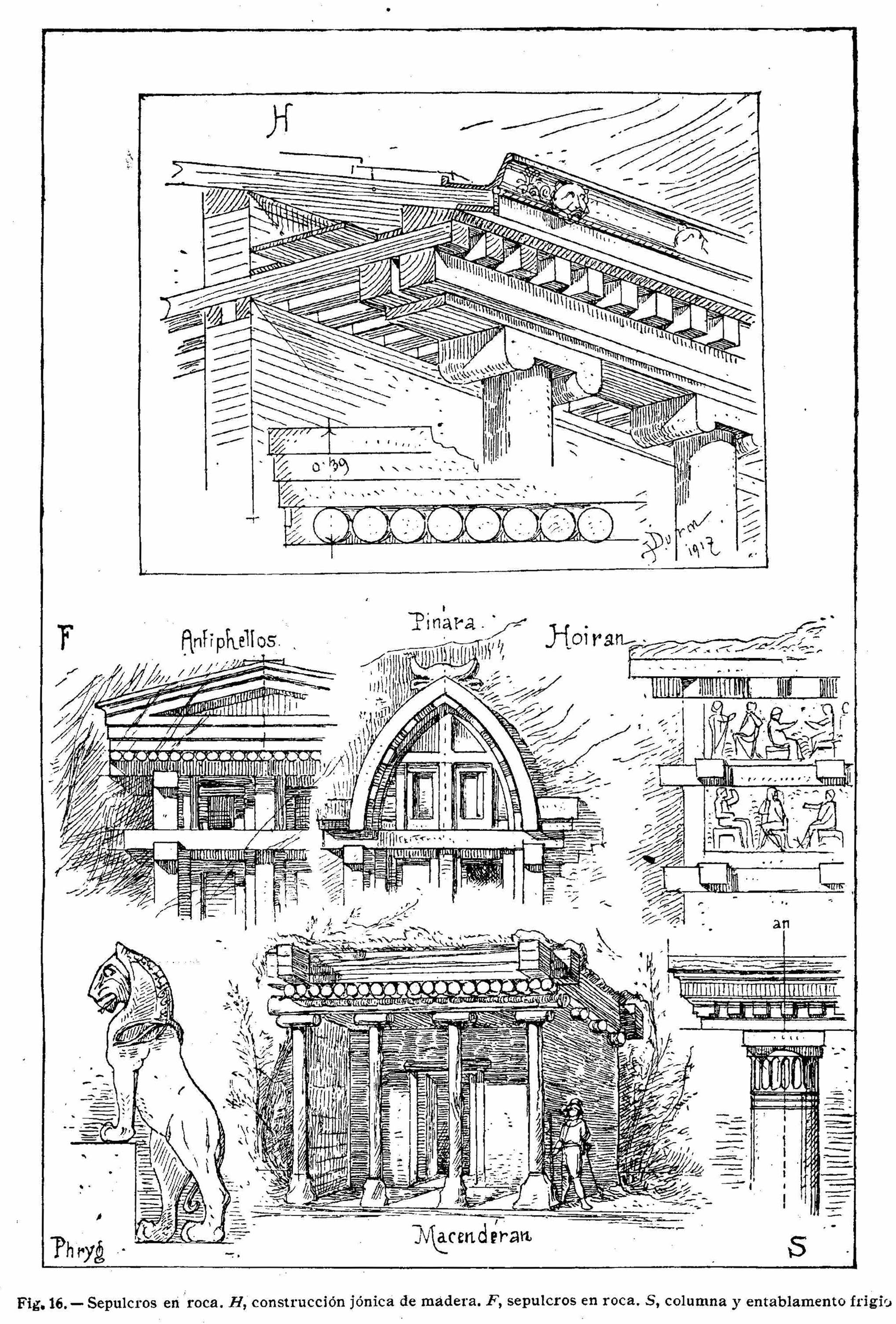 H.- Construcción jónica de madera. F.- Sepulcros en roca. S.- Columna y entablamento frigio (textos del dibujo en español)